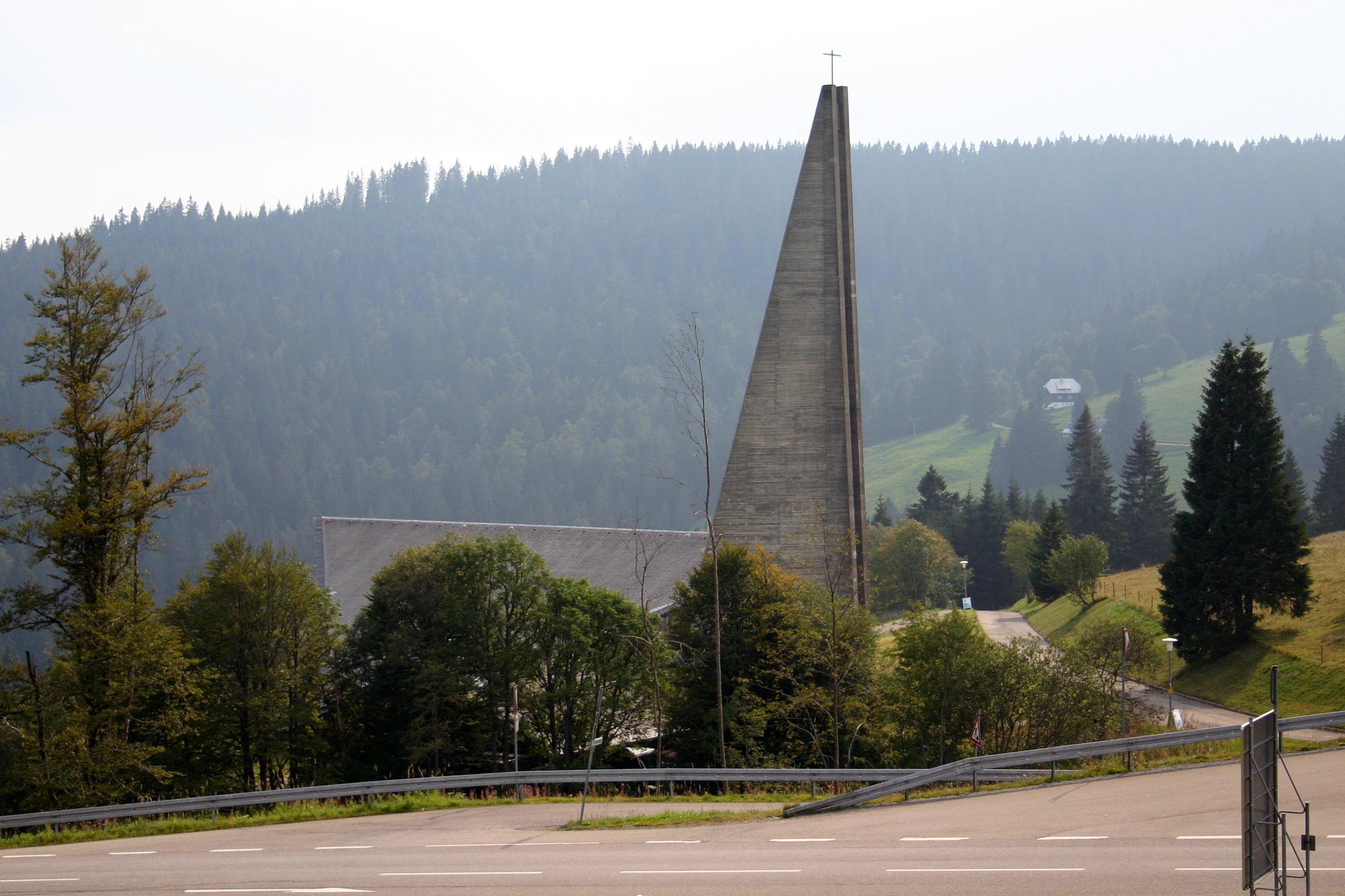 Feldberg (Schwwarzwald), Feldbergkirche Verklärung Christi